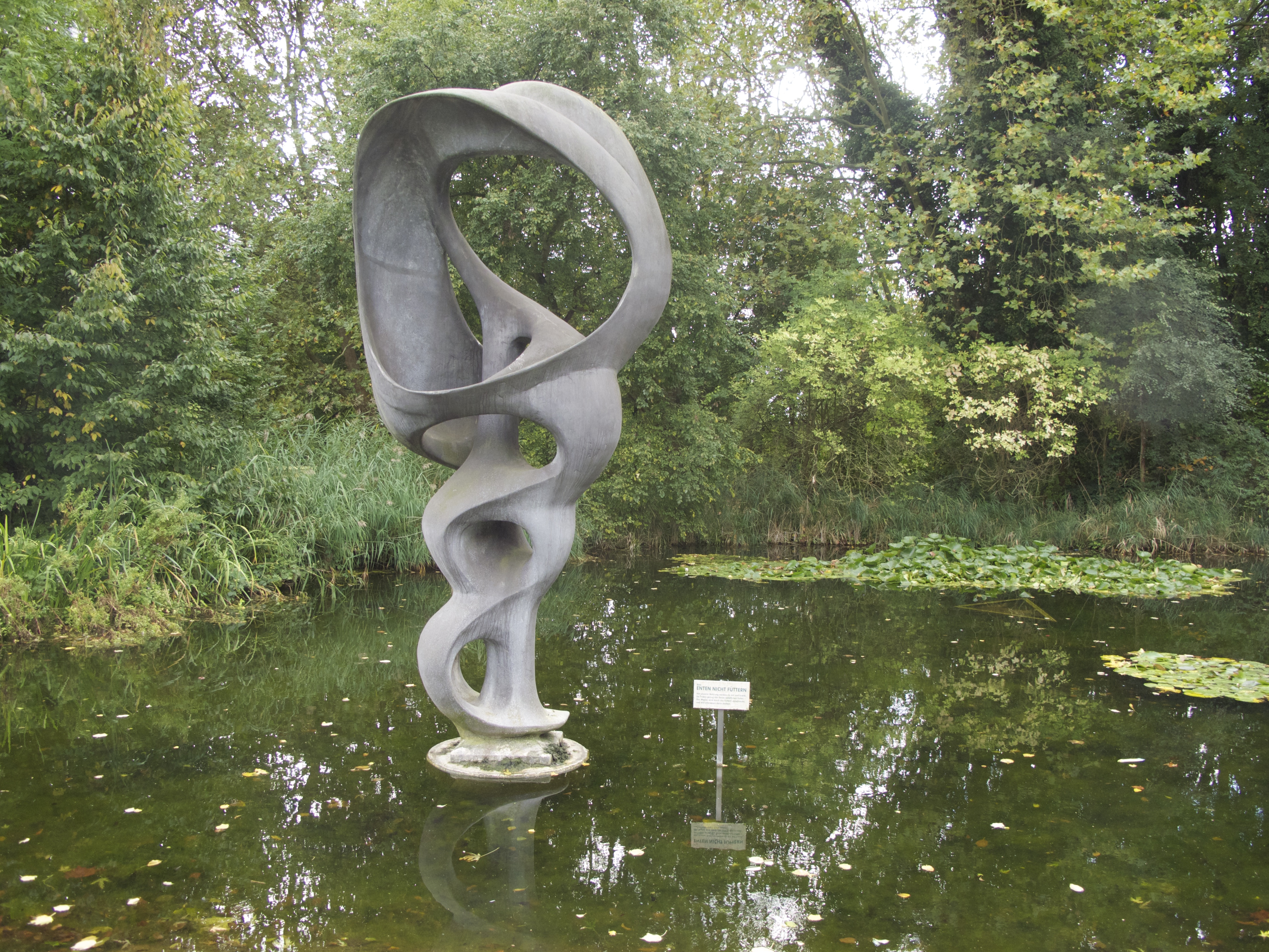 Schneckenplastik des Bildhauers Prof. Hans Breker im Düsseldorfer Nordpark am Aquazoo-Löbbecke Museum.